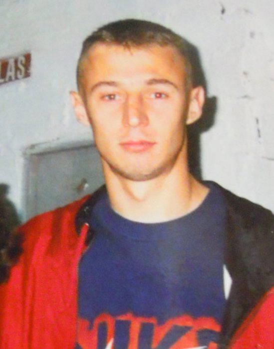 Petr Kouba na súa primeira etapa como xogador do Deportivo da Coruña, nunha visita ao Estadio Municipal de Pasarón na disputa do trofeo Luis Otero de 1996 Imaxes de fútbol